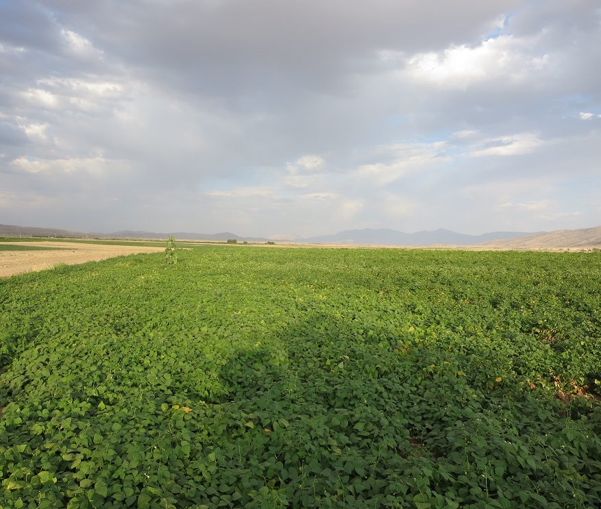 کاشت لوبیا در سرپنیران